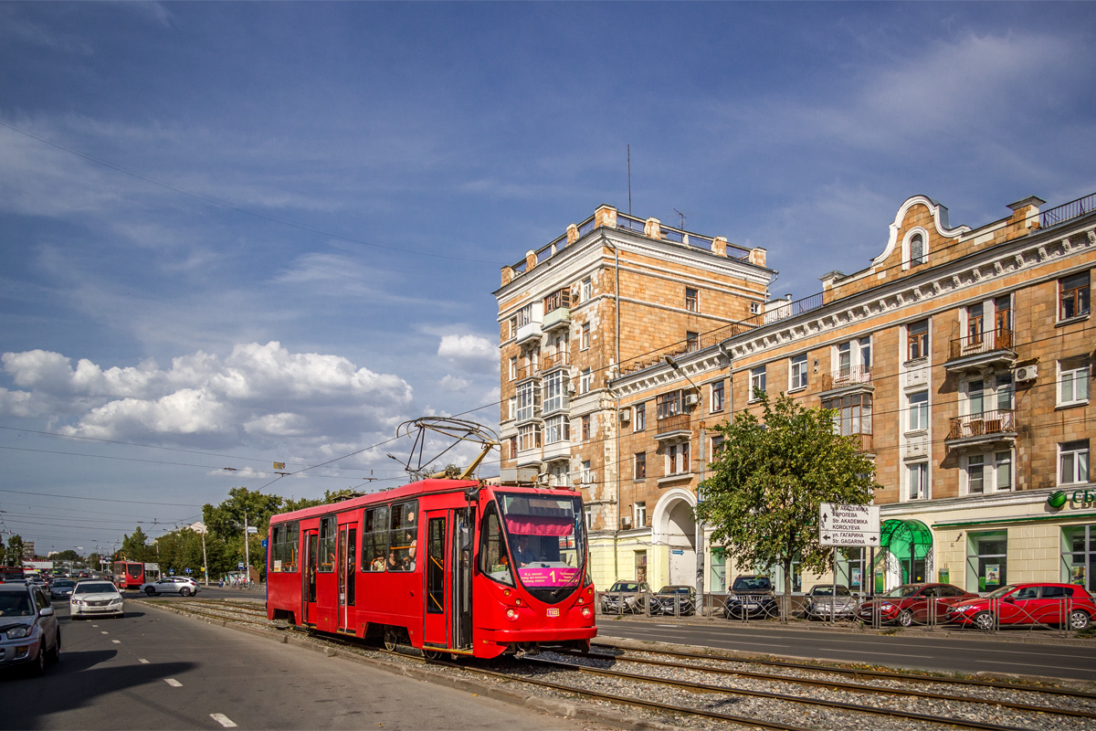 Трамвай ЛМ-99АЭ на улице Декабристов, Казань